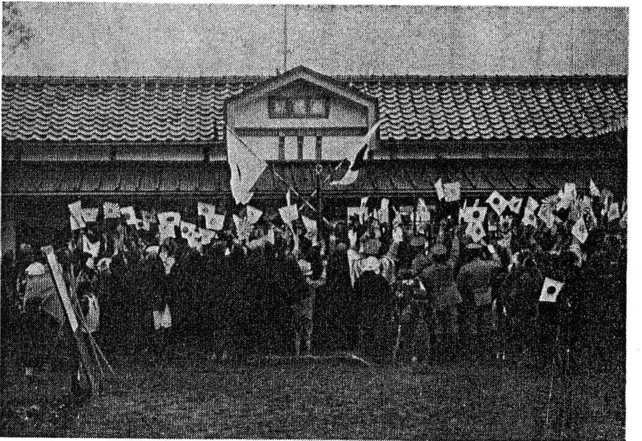 1931年（昭和6年）8月15日開業当時の越中舟橋駅